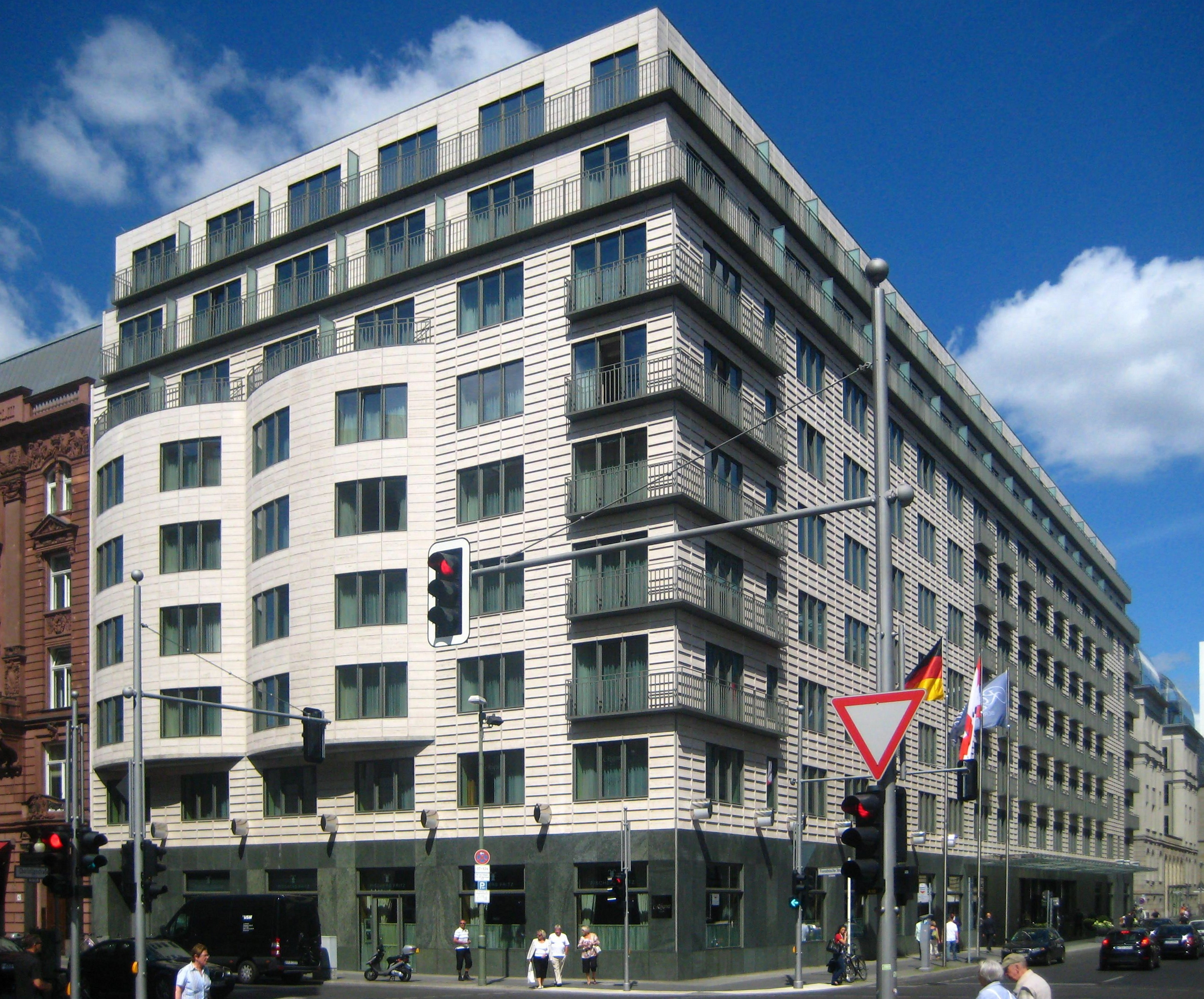 Das Hotel Regent Berlin in der Charlottenstraße 49, Ecke Französische Straße (links), in Berlin-Mitte. Die Stahlbetonkonstruktion mit Travertinfassade wurde 1993-1996 nach einem Entwurf des Architekten Josef Paul Kleihues (Büro Kleihues + Kleihues) erbaut.